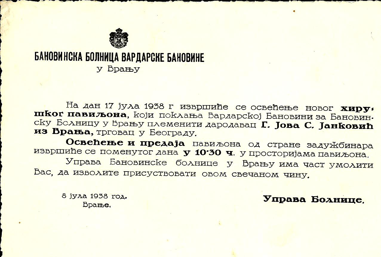 Позивница за отварање Хируршког павиљона у Врању из 1938. чији је дародавац Јован Јанковић Лунга.